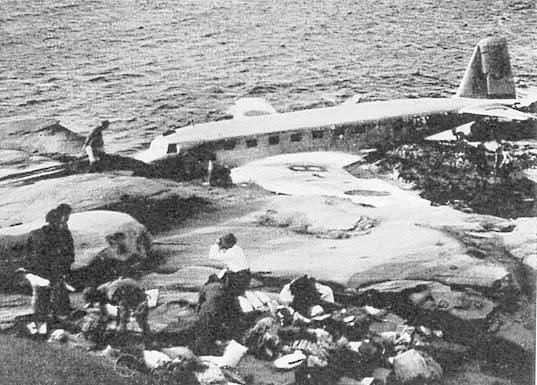 魚釣島の海岸岩場に不時着し、大破した「阿蘇号」と乗客ら